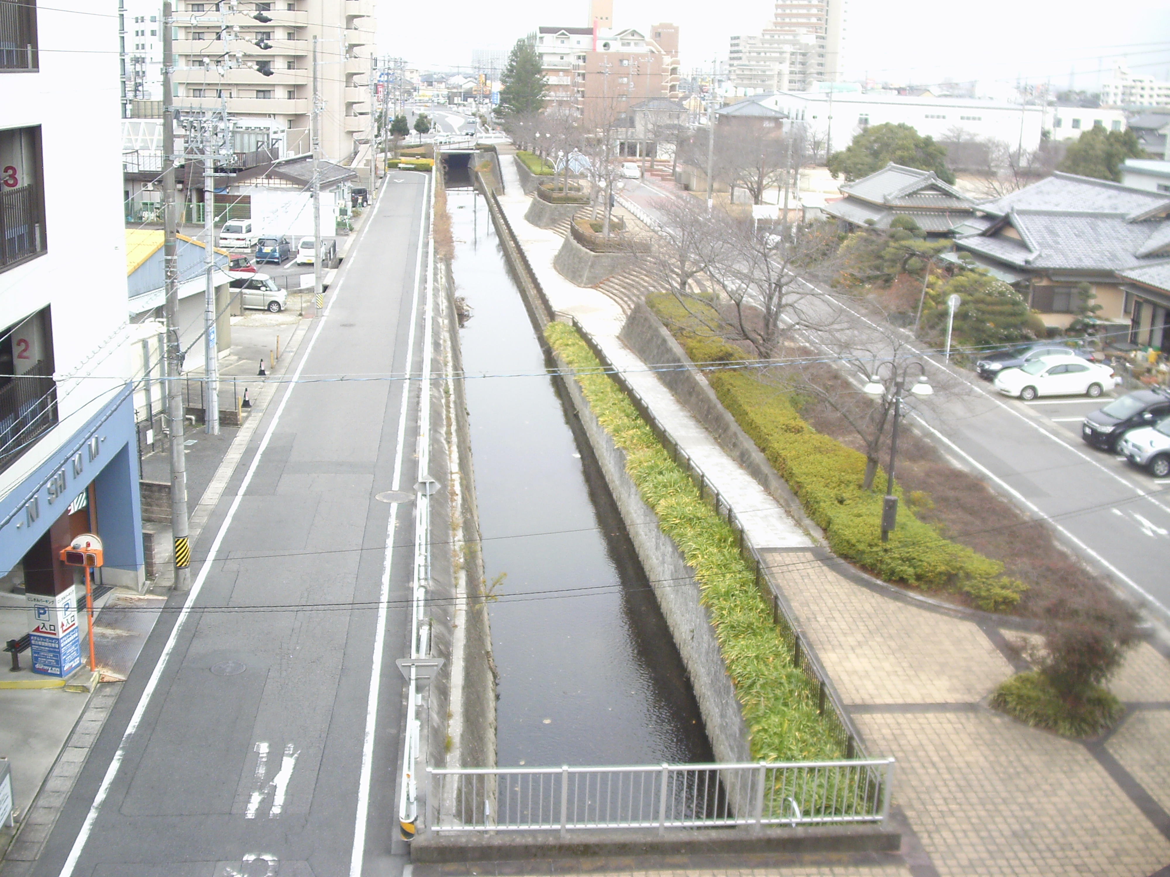 国際かんがい排水委員会のかんがい施設遺産に登録された明治用水。愛知県安城市で東海道新幹線の三河安城駅下を流れる様子を新幹線下り線ホームから見下ろす。